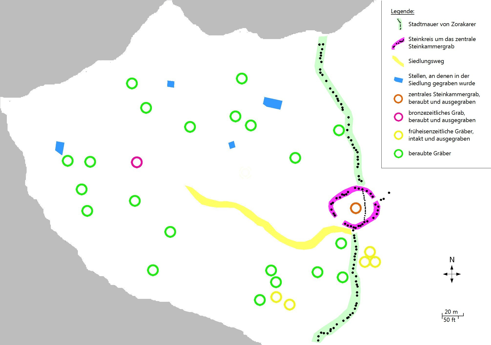 Das Gelände von Zorakarer (Graphik)